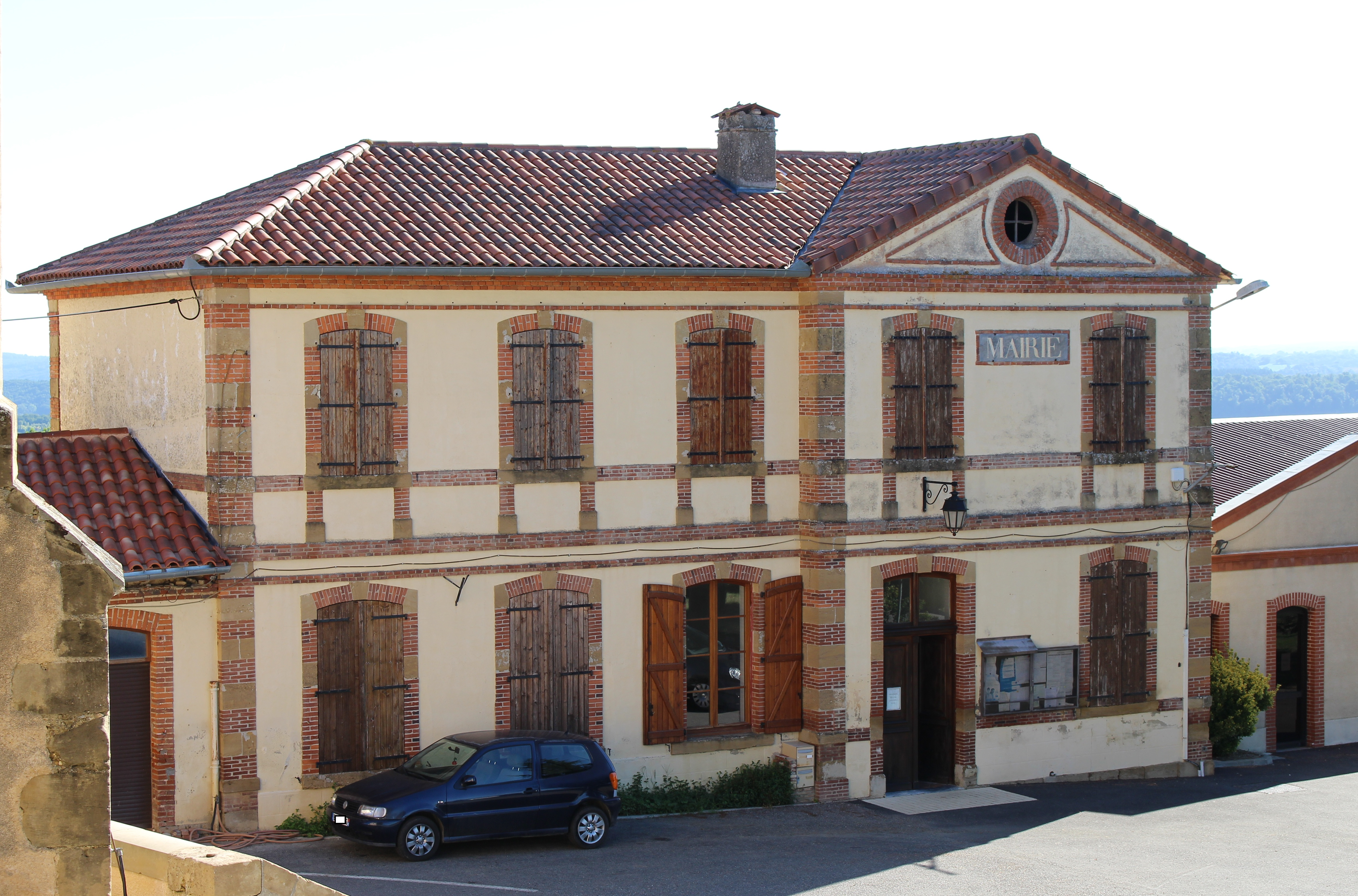 Mairie de Puydarrieux (Hautes-Pyrénées)